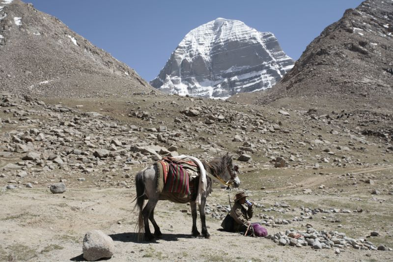 Mt Kailash, Tibet